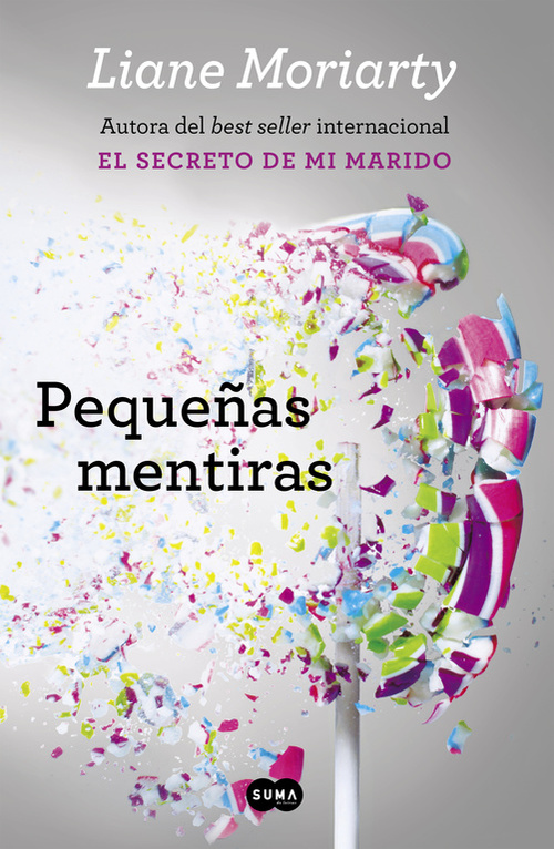 Portada del libro "Big Little Lies" en su versión española.